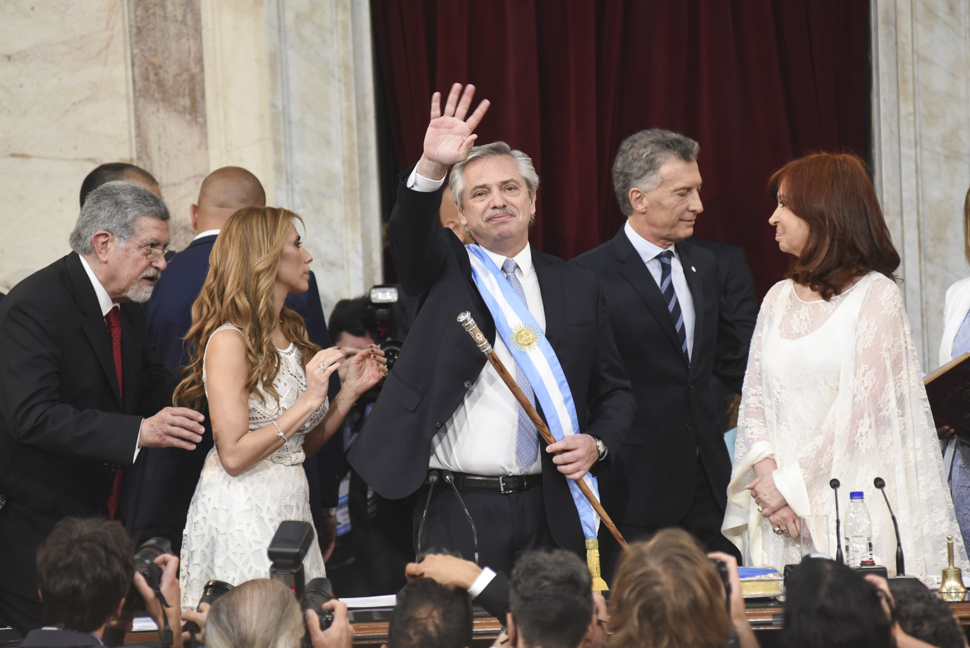 En una histórica ceremonia, Alberto Fernández juró como presidente de la Nación y recibió los atributos de mando de manos de su antecesor, Mauricio Macri. Fue ante la Asamblea Legislativa que sesionó, a partir de las 11:15, en el recinto de la Cámara de Diputados de la Nación. También prestó juramento Cristina Fernández de Kirchner como Vicepresidenta de la Nación.